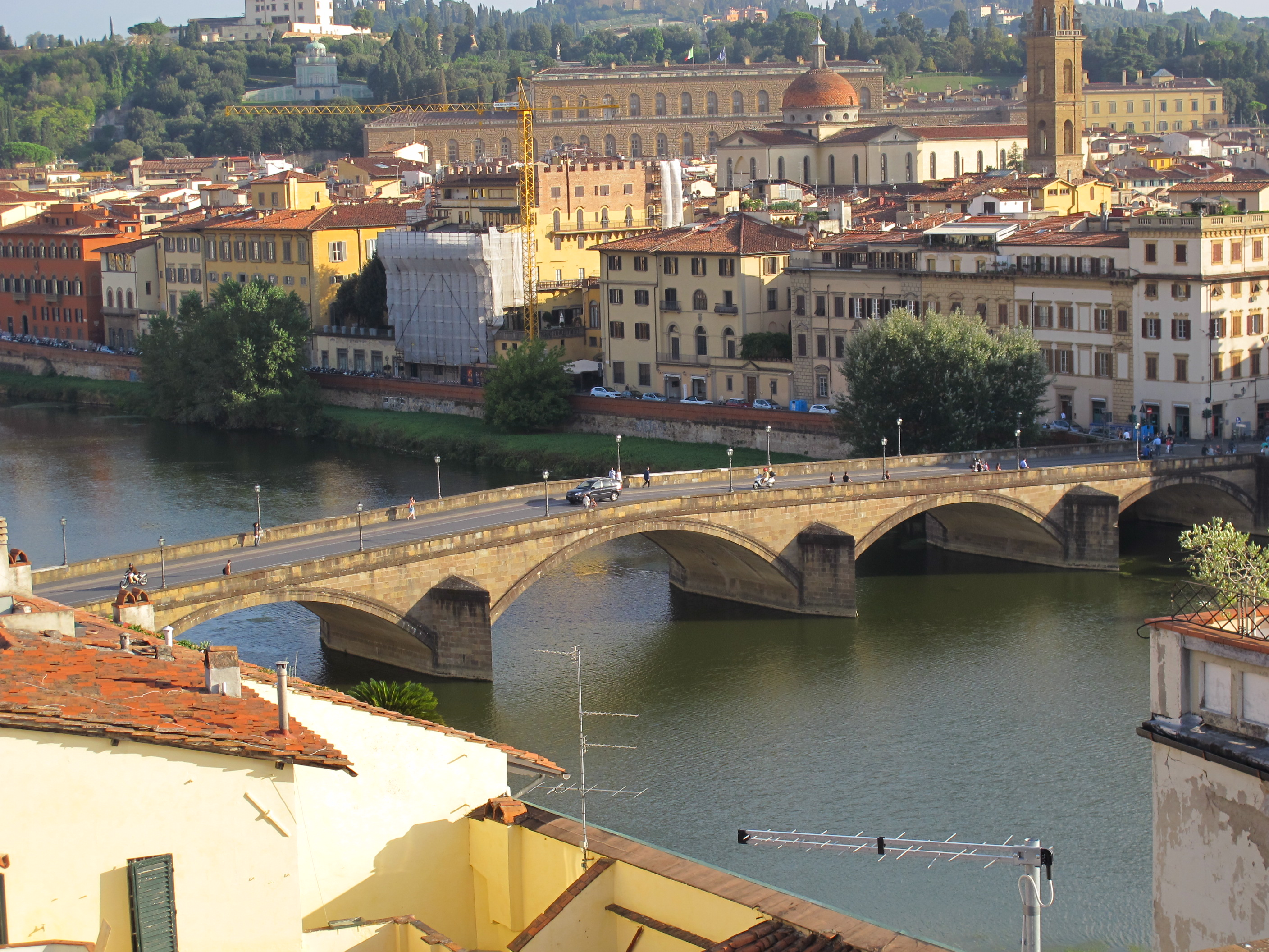 Hotel excelsior, terrazza, vista ponte alla carraia